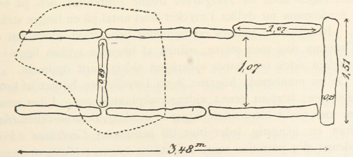 Zeichnung einer Steinkiste auf Visingsö, von Wilhelm Berg